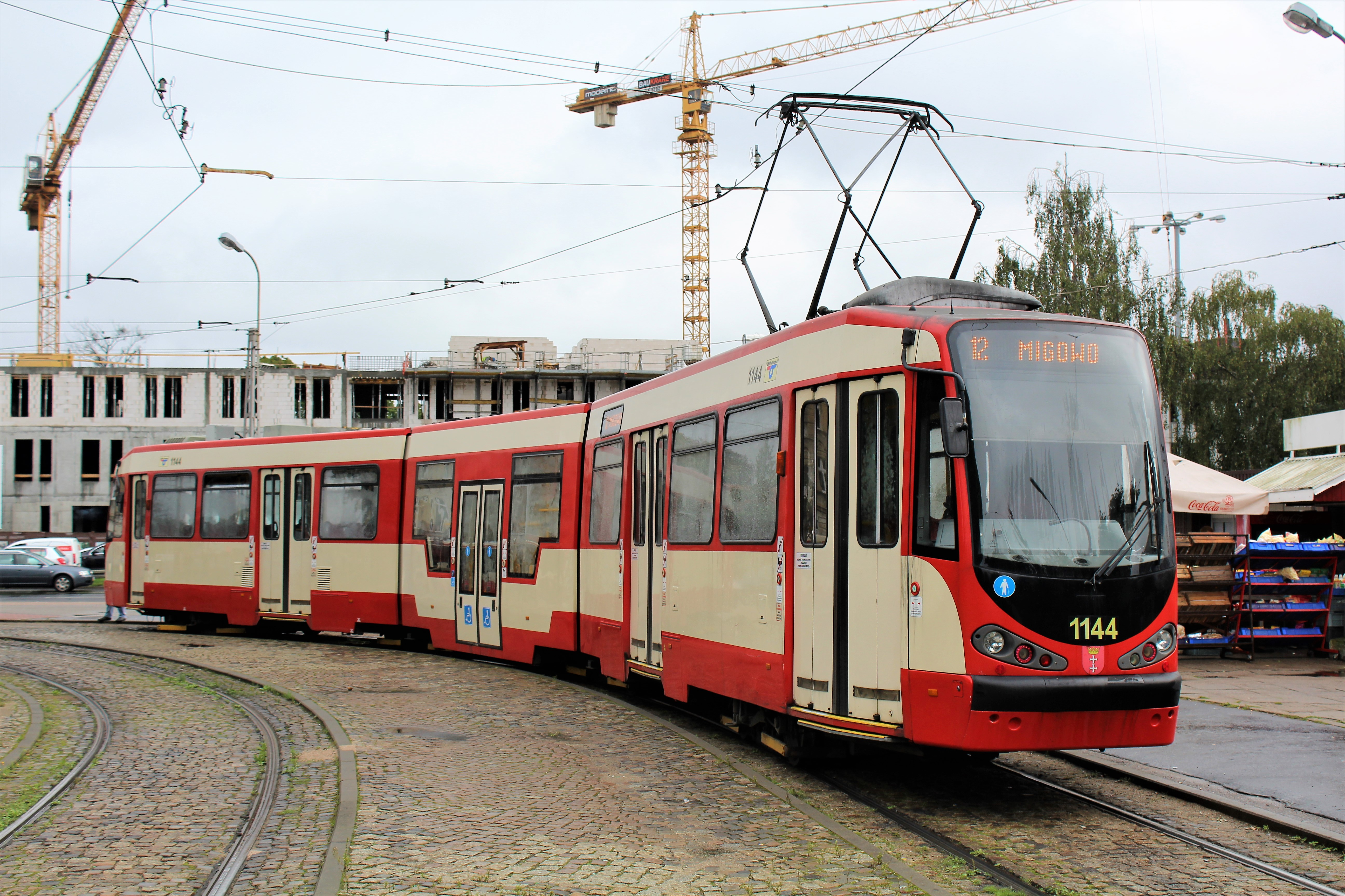 Tramwaj typu N8C-NF w Gdańsku, 2016 r.